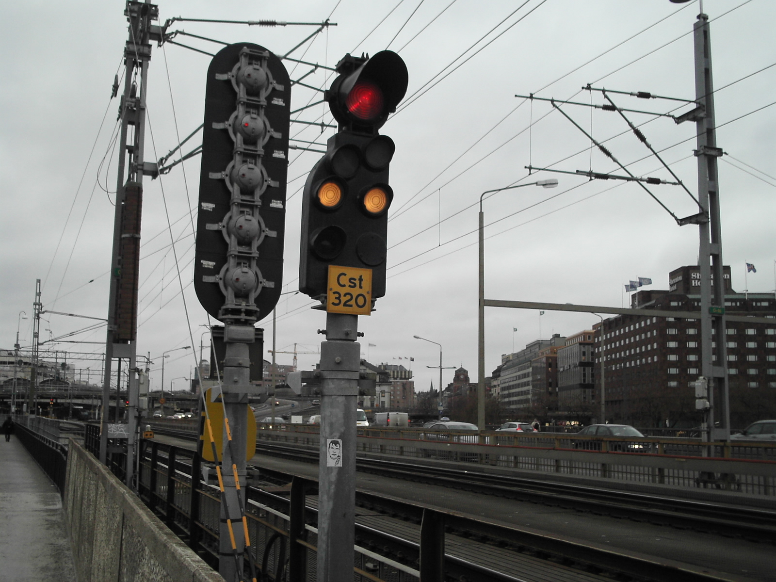 Small main signal